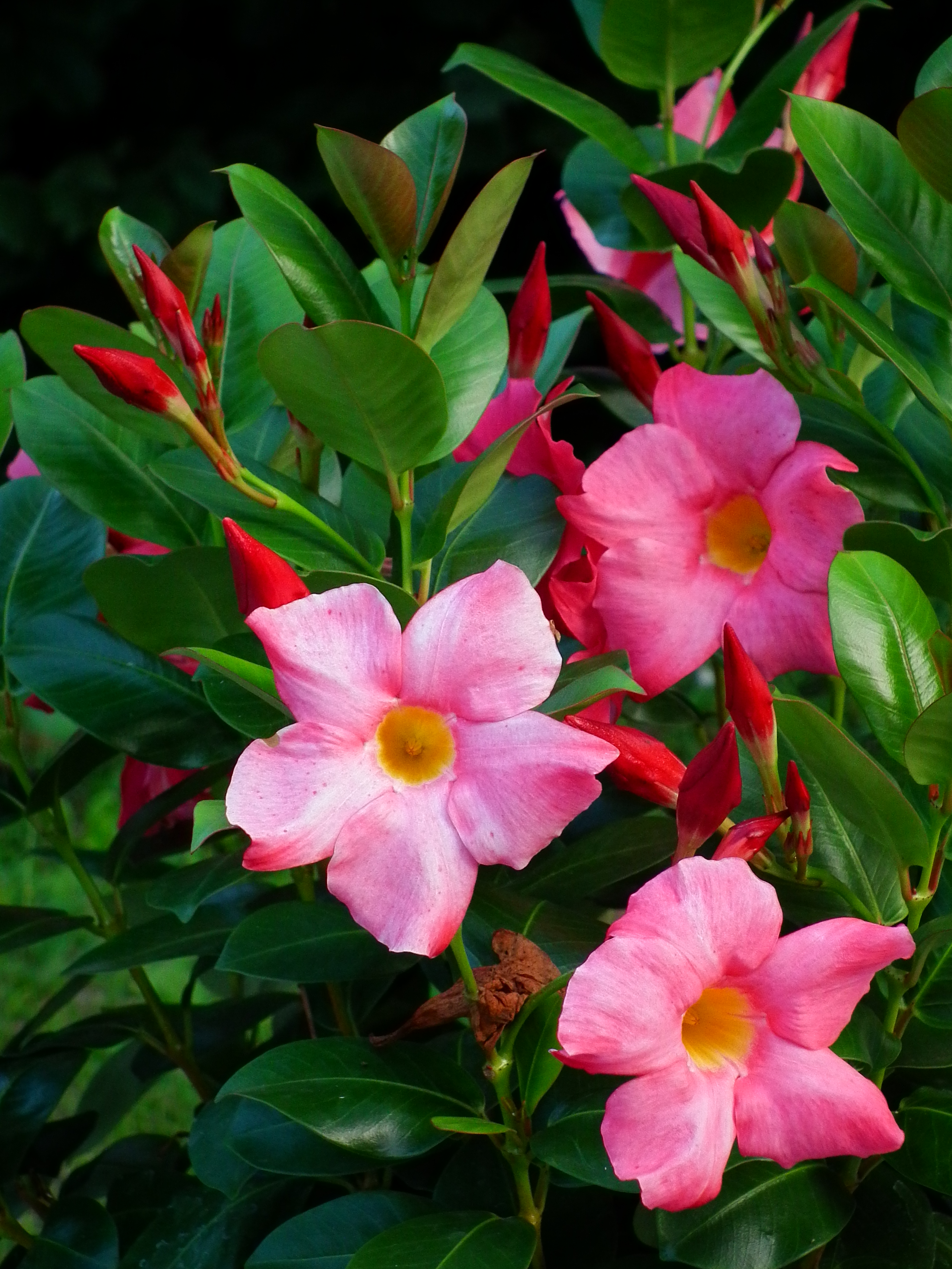 Blüten einer mir unbekannten Mandevilla (eventuell Dipladenia sanderi), fotografiert im nördlichen Baden-Württemberg, Deutschland)